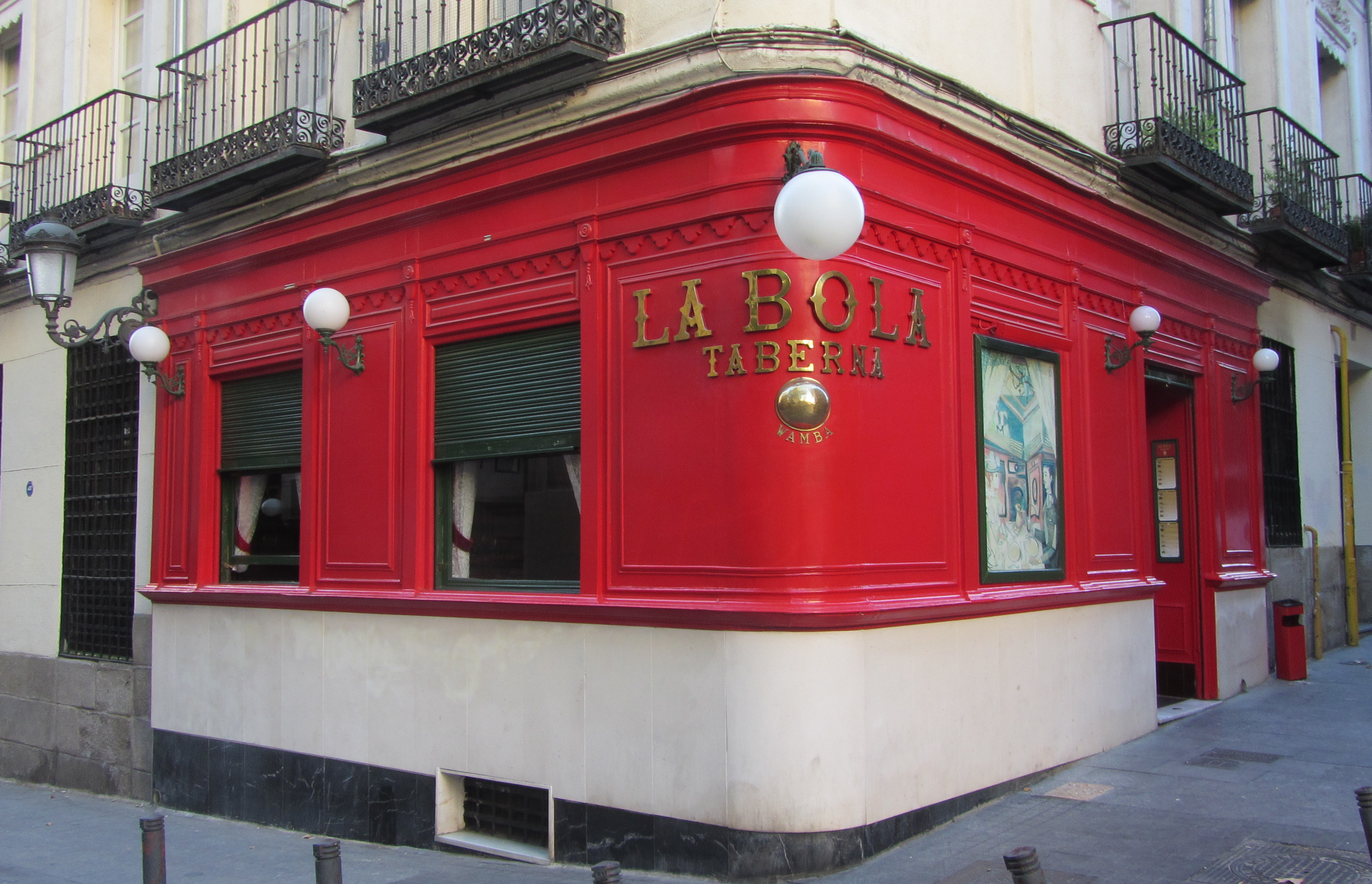 Taberna "La Bola" situada en la calle La Bola nº 5, esquina con calle Guillermo Rolland, Madrid, (España). Es del siglo XIX.